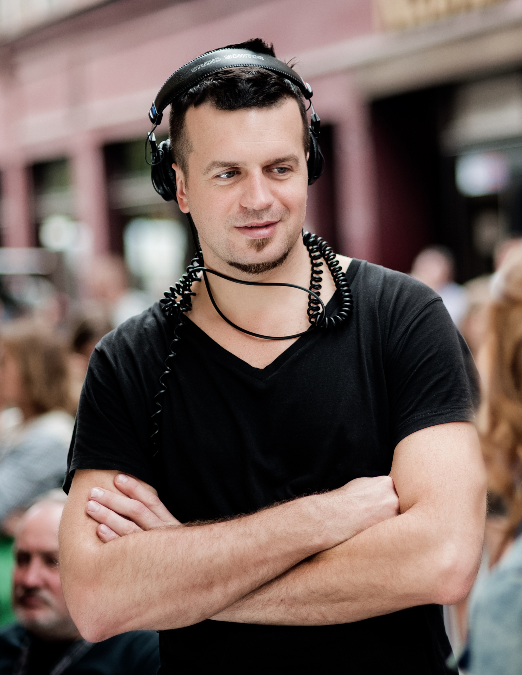 Marcin Wrona